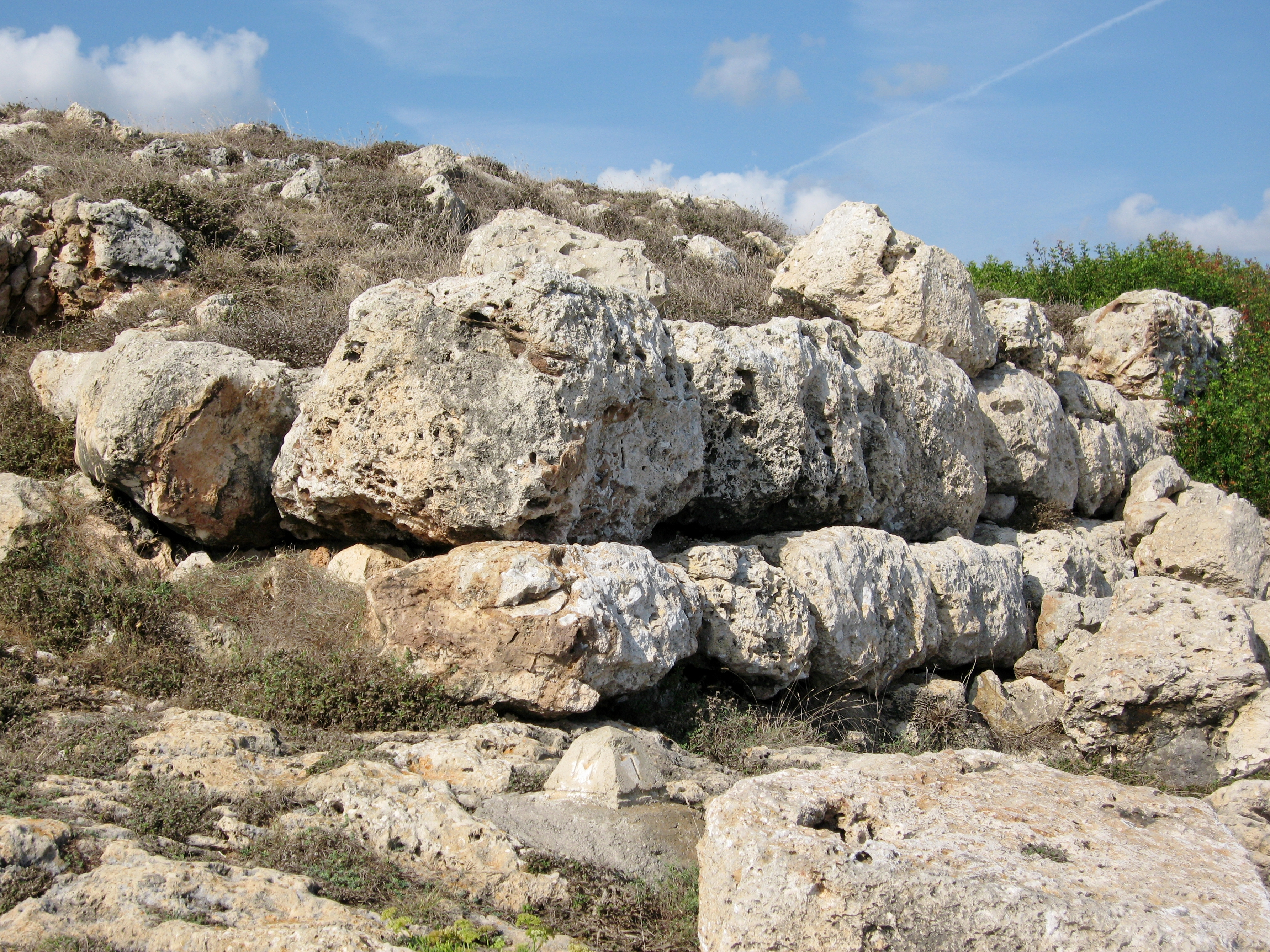 Talayot an der Küste der Siedlung Cala Morlanda, Gemeinde Manacor, Mallorca, Spanien